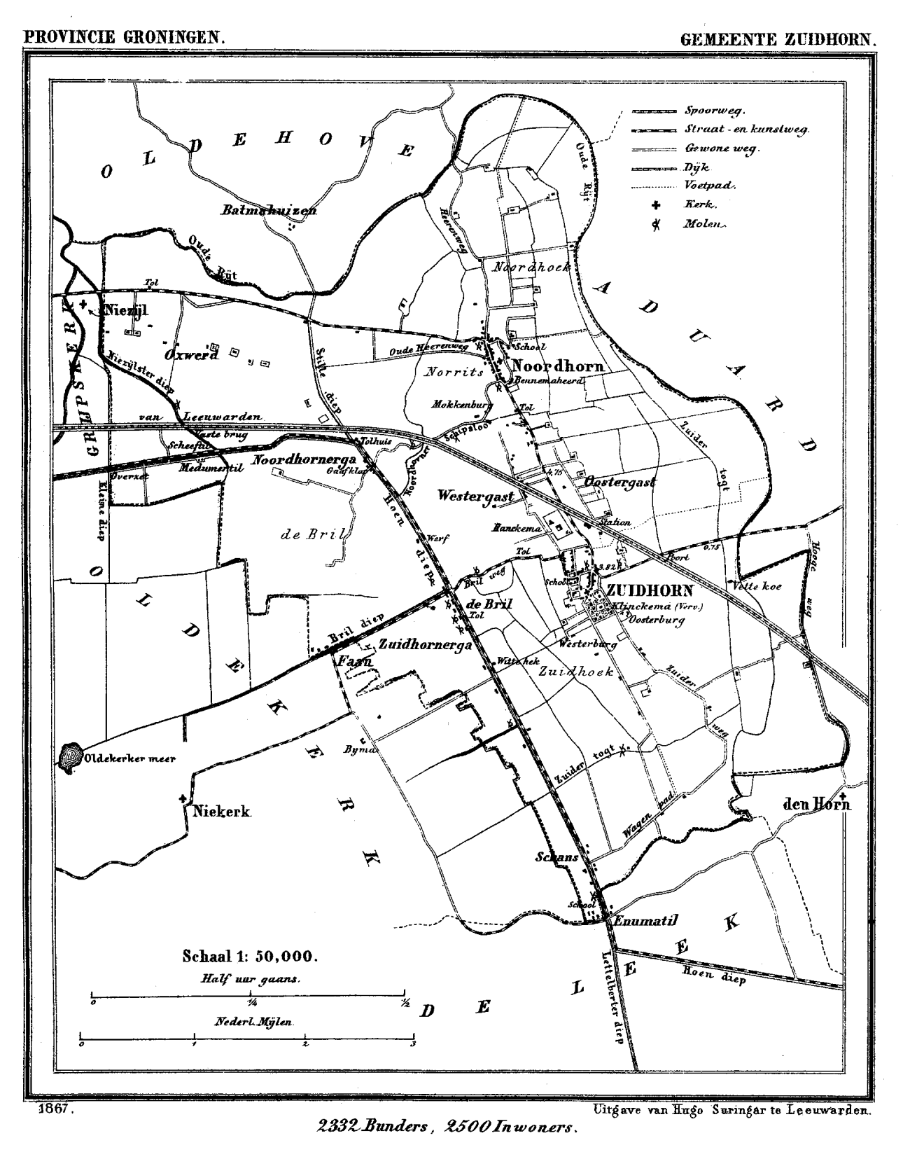 Kaart van Zuidhoorn uit Gemeente Atlas van Nederland, J. Kuyper 1865-1870, Uitgave Hugo Suringar Leeuwarden.